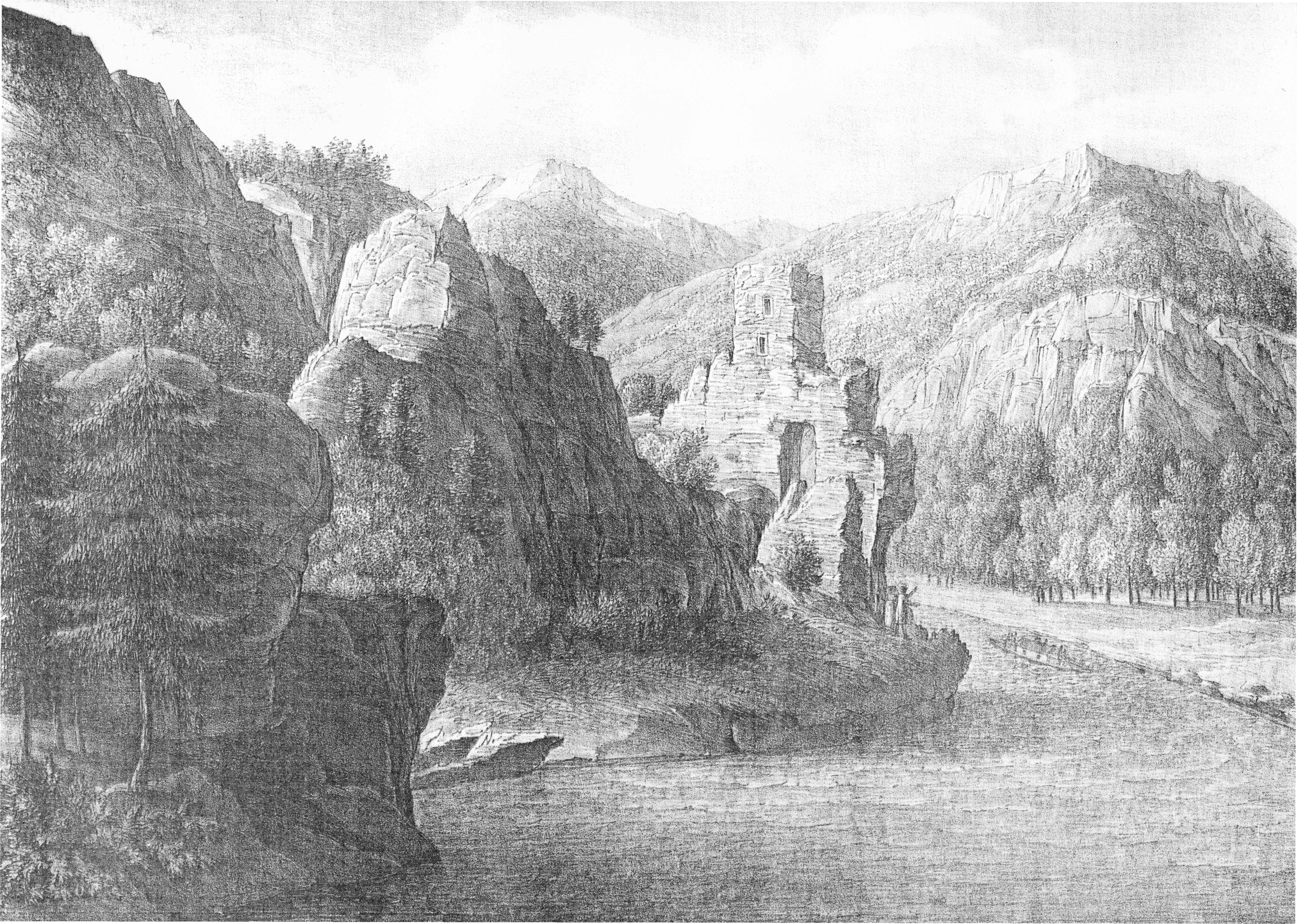 Turm auf dem Langenstein (Ausfahrt aus dem Strudel)